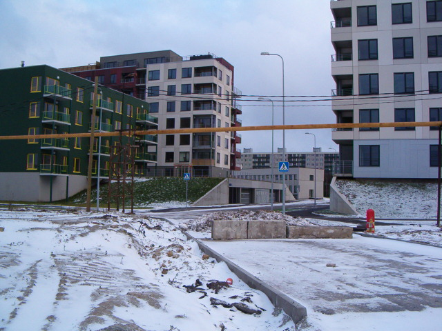 Aiandi tänav. Kadaka asum Tallinn